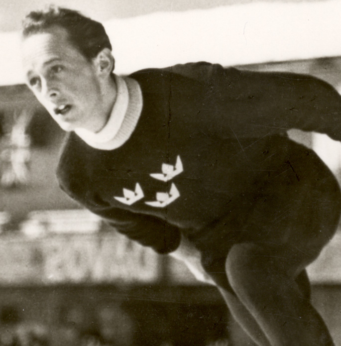 Carl-Erik Asplund